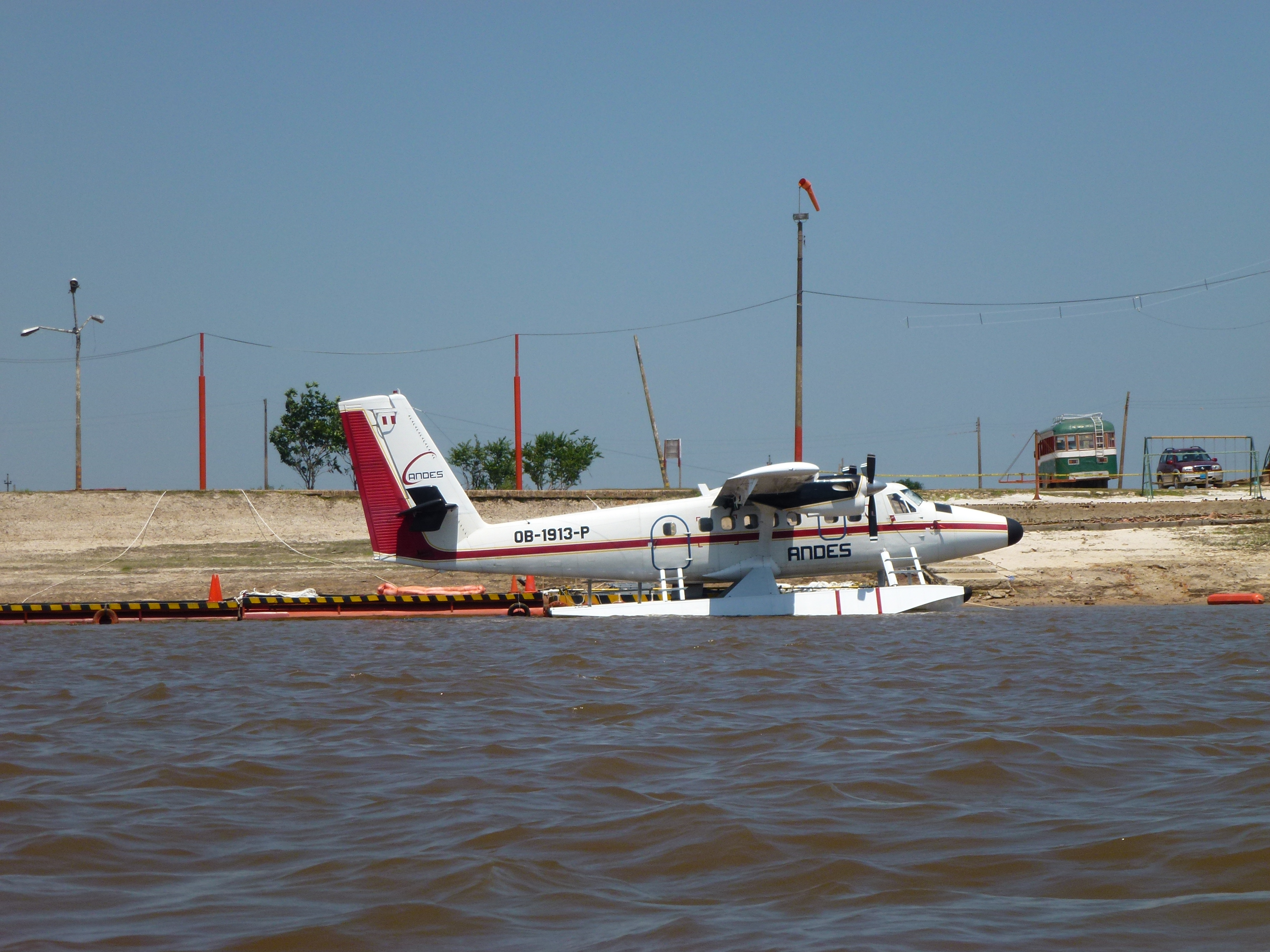 Hidroavión de flotadores en Iquitos